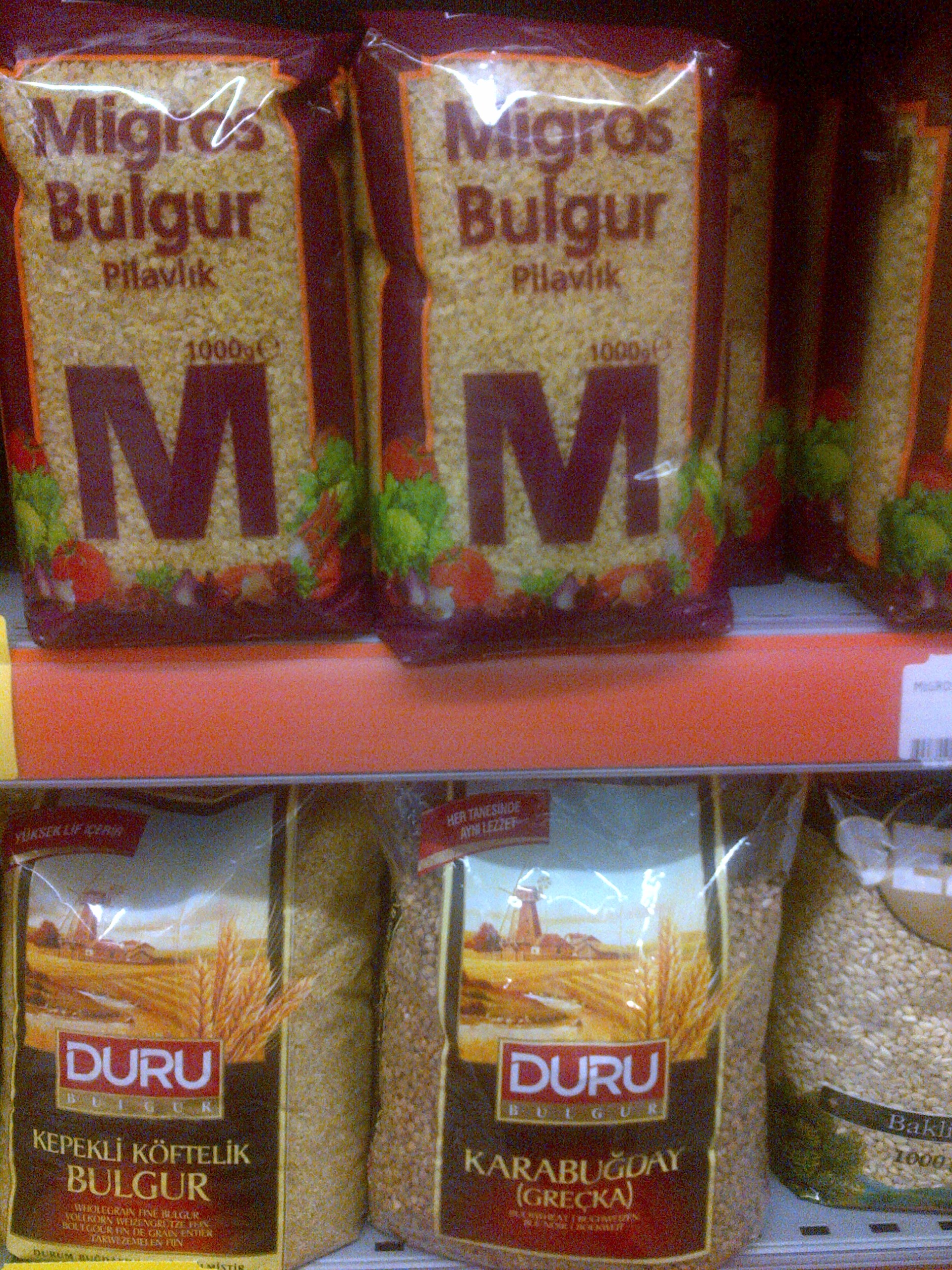 Algunos variantes de bulgur en un supermercado de Turquia.